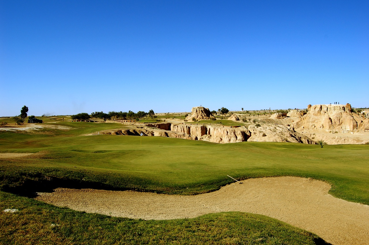 Terrain de golf de Tozeur (Tunisie)